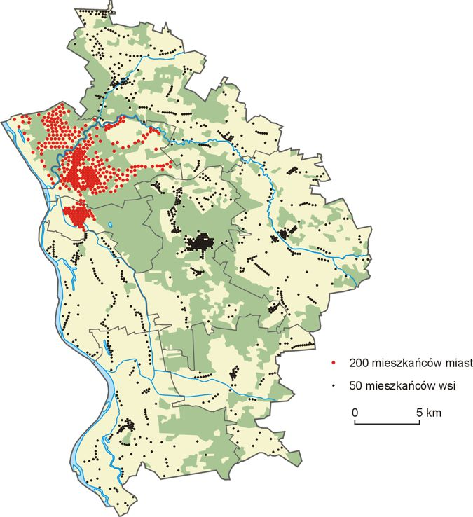 Mapa kropkowa wielowagowa – mapa rozmieszczenia ludności powiatu otwockiego w 2011 roku (wg Narodowego Spisu Powszechnego 2011)